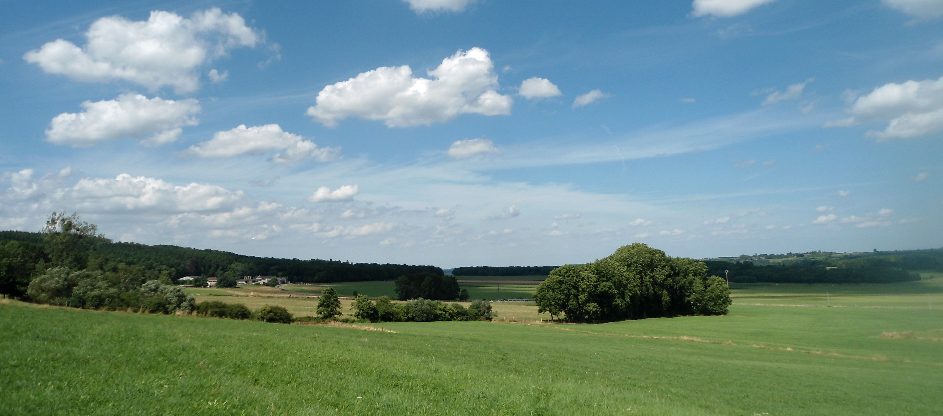 La Calestienne : les chantoir(e)s de Pironboeuf entre Harzé et Xhoris. A gauche, les forêts d'Ardenne. A l'horizon, à droite, crête du Condroz